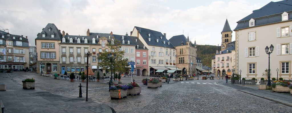 De "Moart" zu Iechternach. Kategorie:Gemeng Iechternach